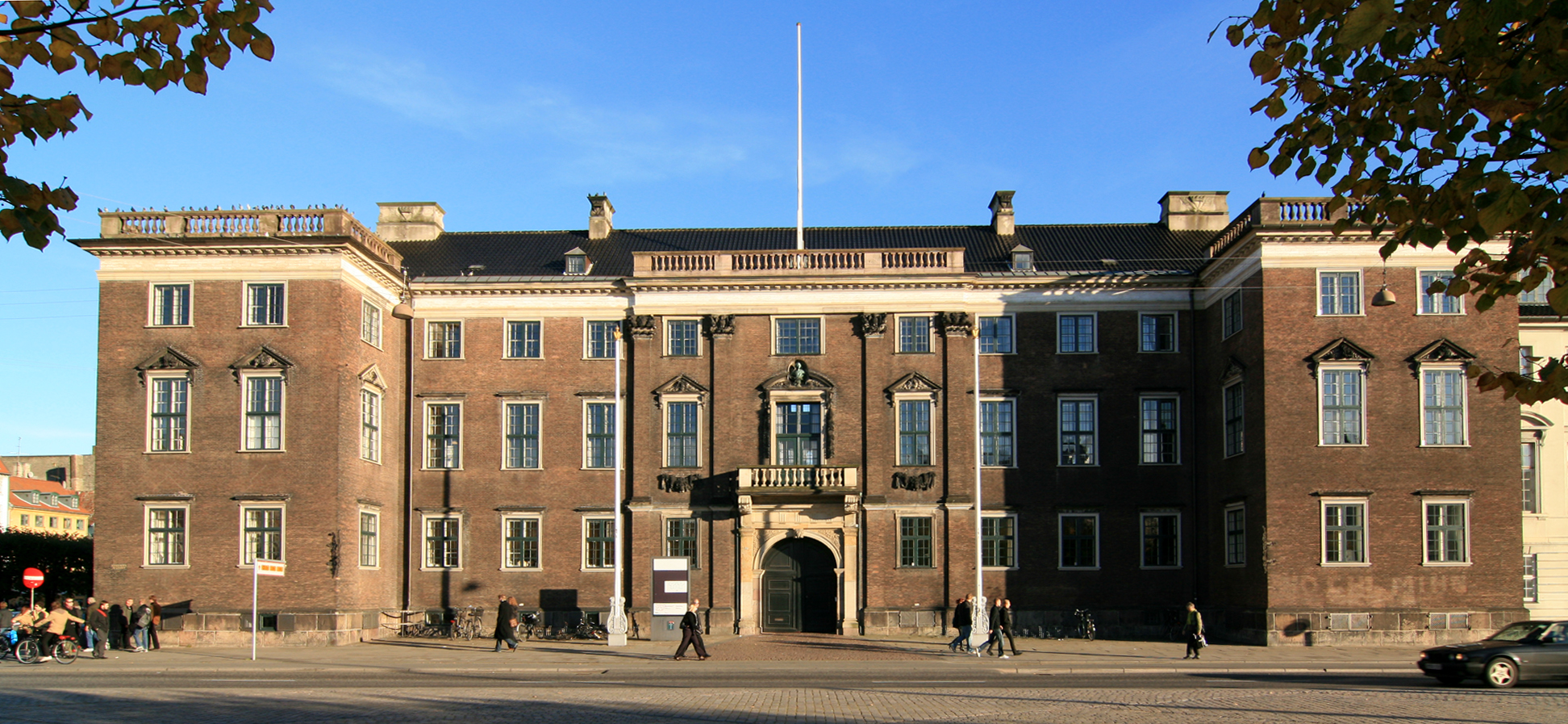 Charlottenborg, Kongens Nytorv, Copenhagen.